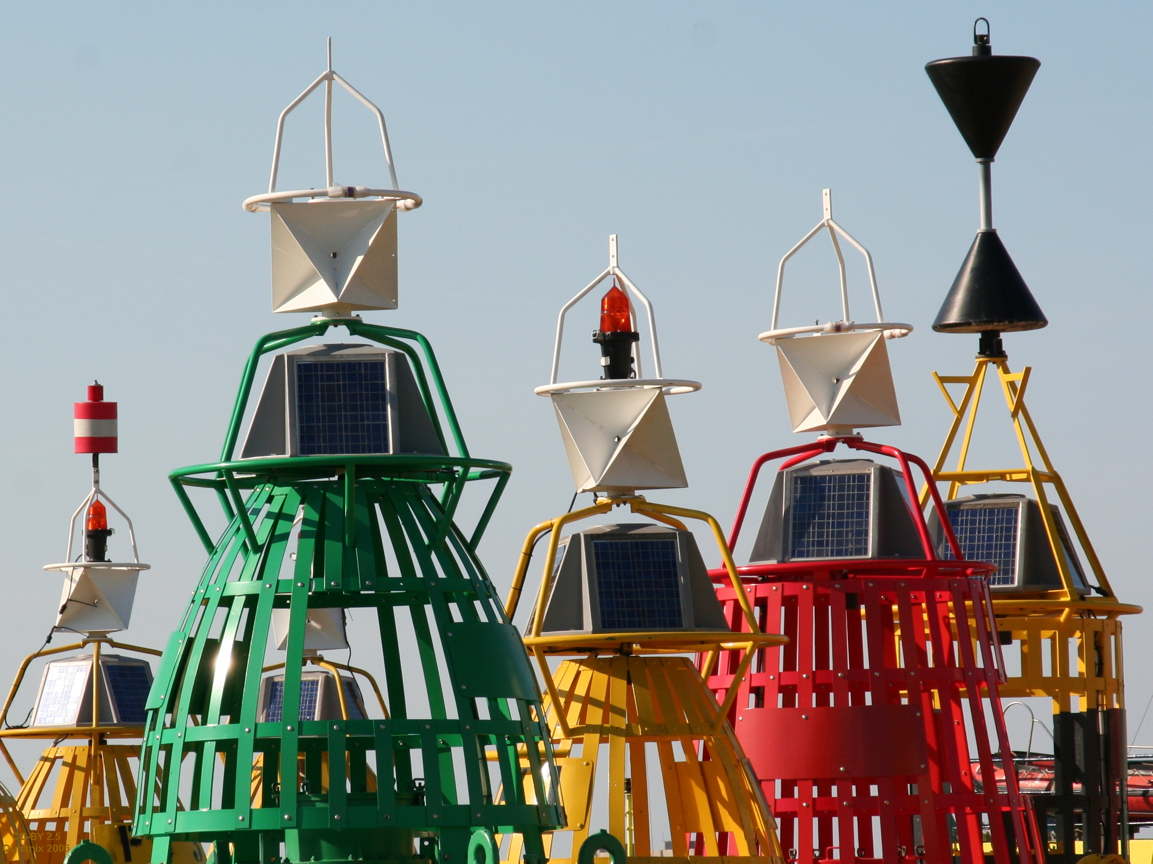 Diverse boeien met radarreflector, in opslag nabij Rozenburg. Eigen foto.